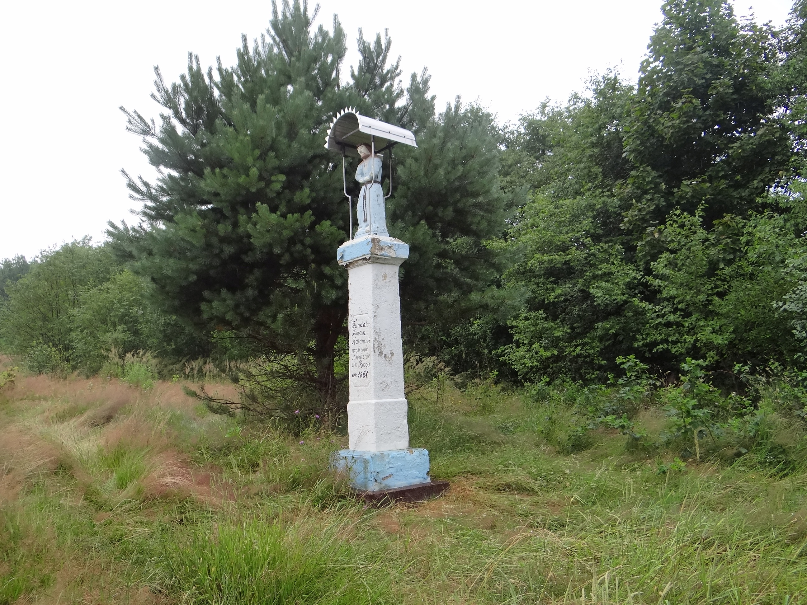 Figurka w Krzeszowie